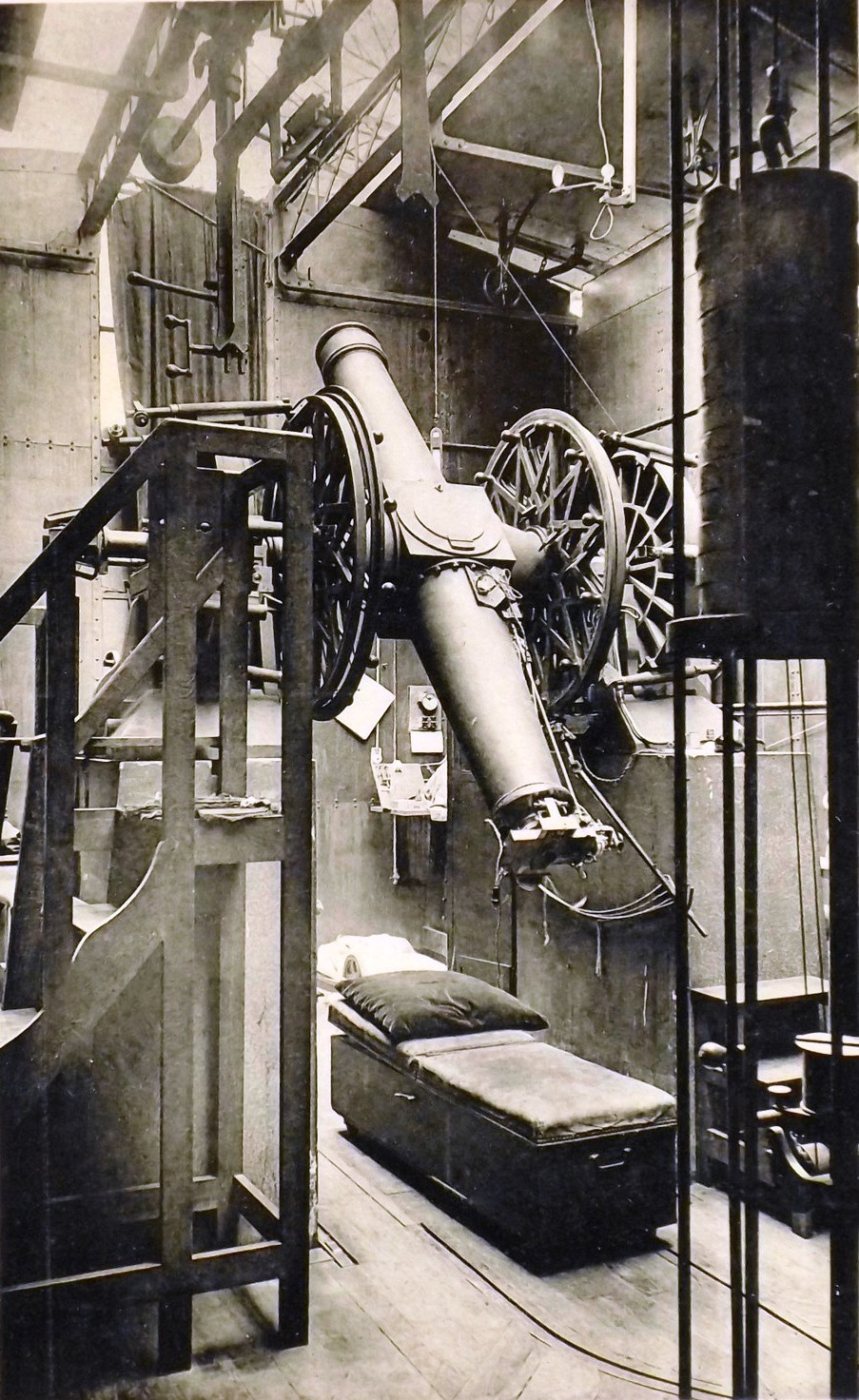 Lunette méridienne dite du jardin, offerte à l'observatoire de Paris par Raphaël Bischoffsheim en 1874.